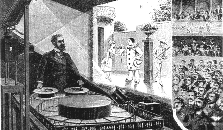 Émile Reynaud y el Teatro óptico